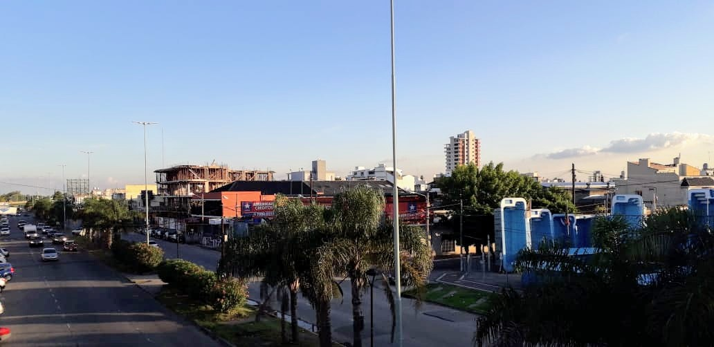 Panorámica Cruce Varela desde Avenida Calchaquí